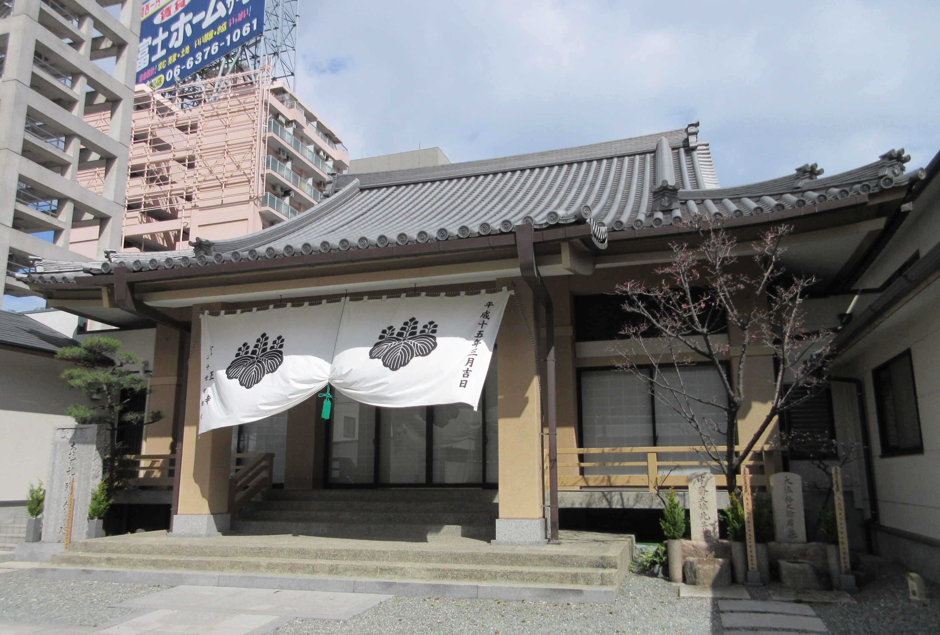 成正寺 (大阪市)